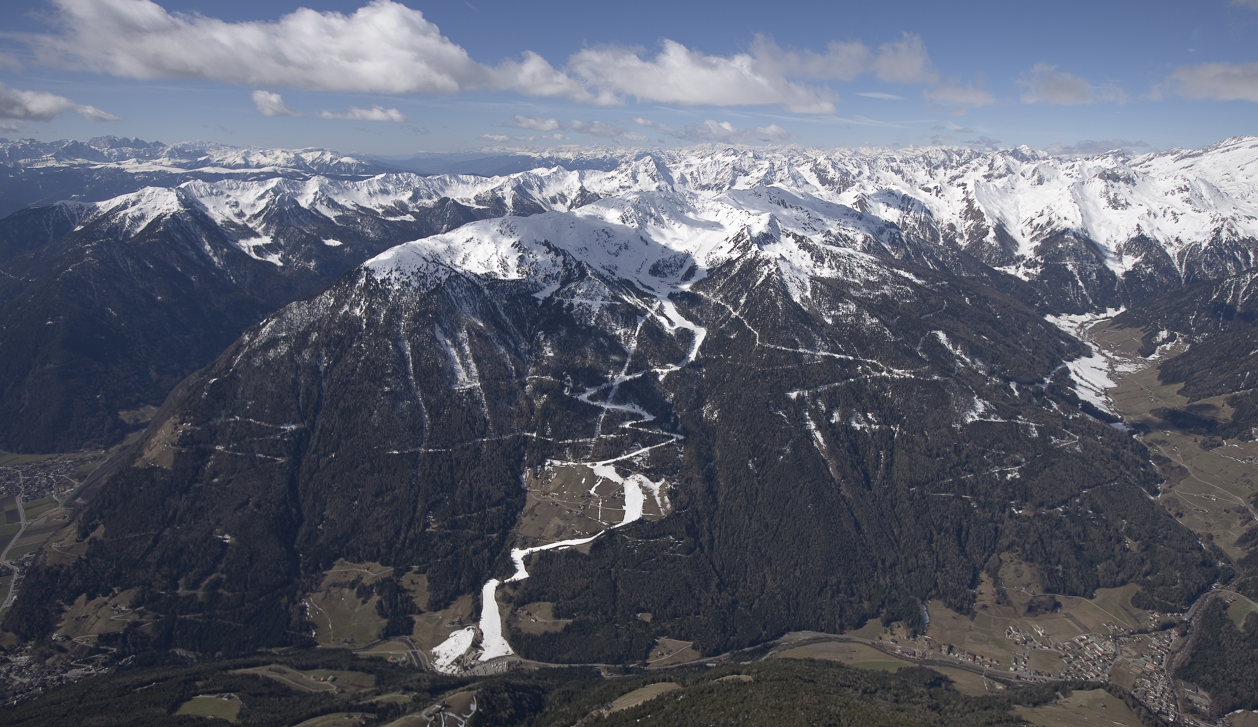 Berg Speikboden von etwa Nordost, links der Ort Sand in Taufers, rechts Luttach, Gemeinde Ahrntal; das Tal rechts des Berges ist das Weißenbachtal; im Hintergrund die Zillertaler Alpen